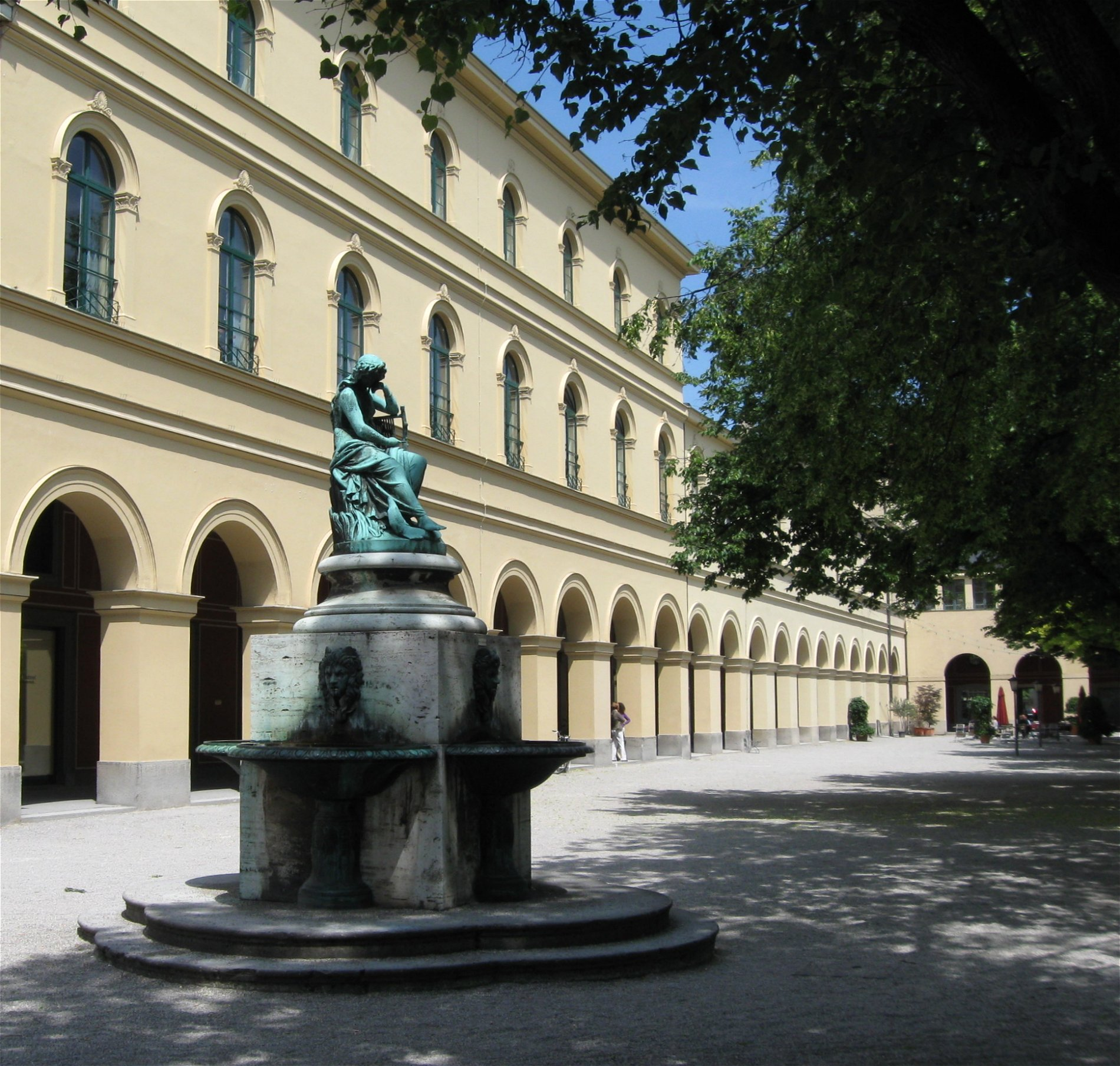 Hofgarten in München, Nymphenbrunnen von Ludwig von Schwanthaler, 1852/53